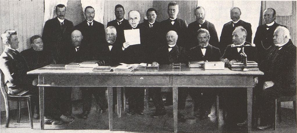 Styre og forstanderskap i Snåsa sparebank i 1914. Sittende fra venstre: O. Bomo, R. Kjenstad, Tølløv S. Kjøbli, Nils Muus, Lorents Seem, Ole Eggen, O. Tømmerås, B. Brønstad. Stående fra venstre: Lorents Belbo, Erik Belbo, Emil Mona, Ole Husaas, Jørgen Gravbrøt, Ole Oldernes, H.A. Svarva, L.F. Klev, S. Brendahl